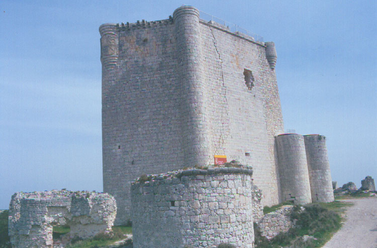 Castillo - Íscar (Valladolid) - Diapositiva 48 x 48 Color